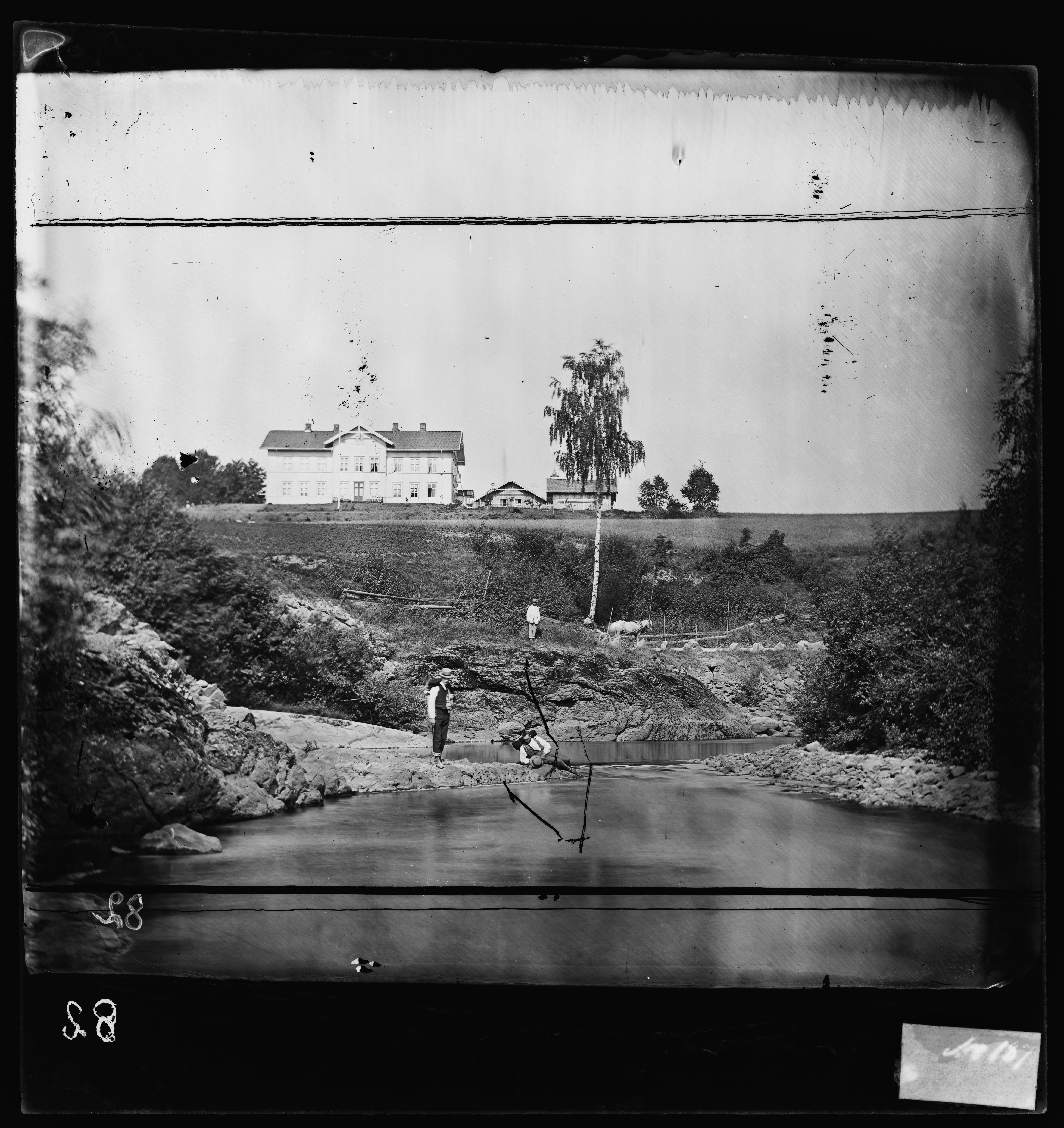 Sted: Hamang Kommune: Bærum Fylke: Akershus Tagger